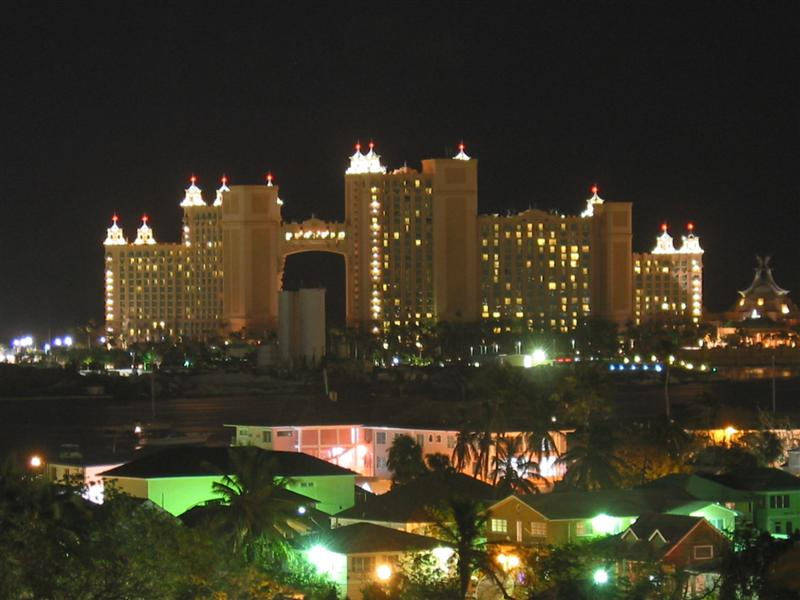 Atlantis Hotel, Paradise Island, Bahamas.Atlantis Bahamas